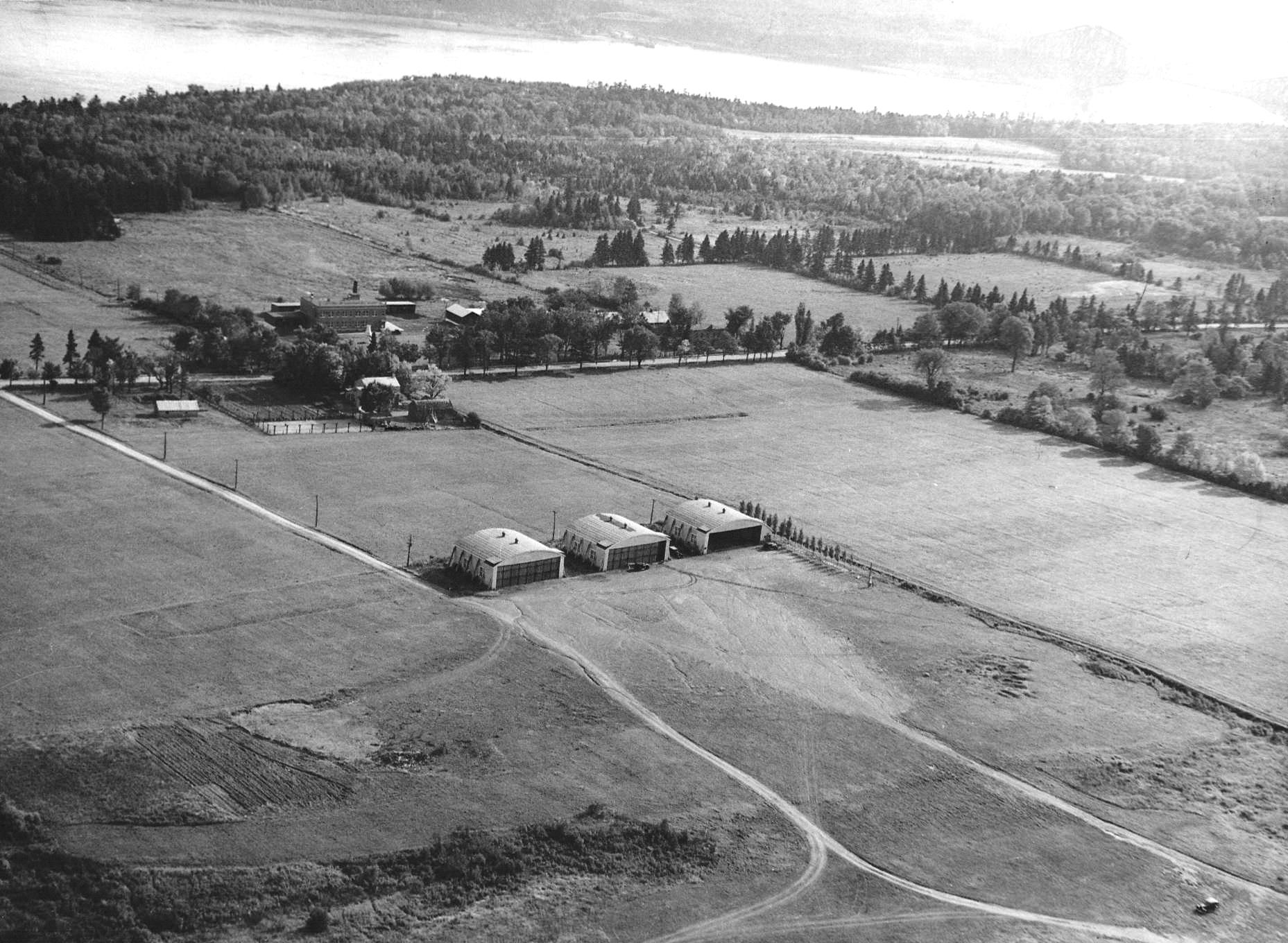 Vue aérienne de l’aéroport du Bois-Gomin, (négatif de nitrate), 1937.